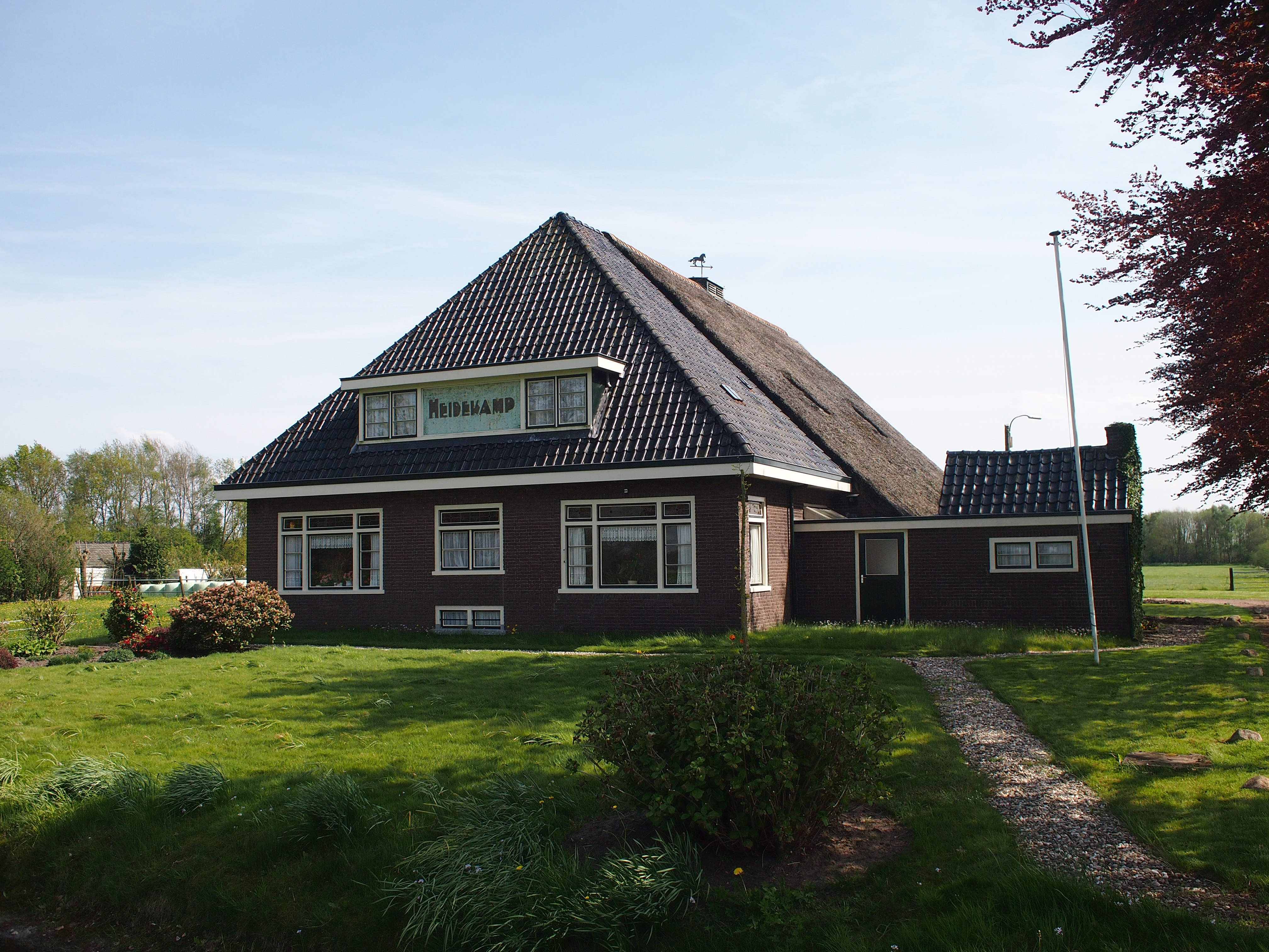 Boerderij stelptype